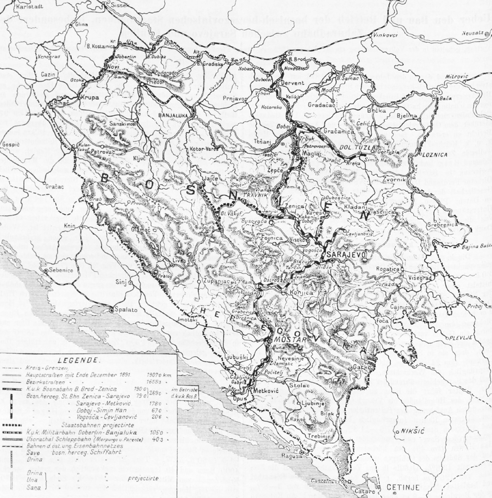 Eisenbahnnetz Bosniens und der Herzegowina 1892 k.u.k. Bosnabahn: Bosanski Brod–Zenica Bosnisch-Herzegowinische Staatsbahnen: Zenica–Saraejvo und Doboj–Simin Han (betrieben durch die Bosnabahn) Saraejvo–Metković Vogošća–Čevljanovići Janjići–Donji Vakuf–Jajce/Bugojno und Podlugovi–Vareš (beide damals projektiert) k.u.k. Militärbahn Dobrljin–Banja Luka Usoratalbahn Doboj–Teslić